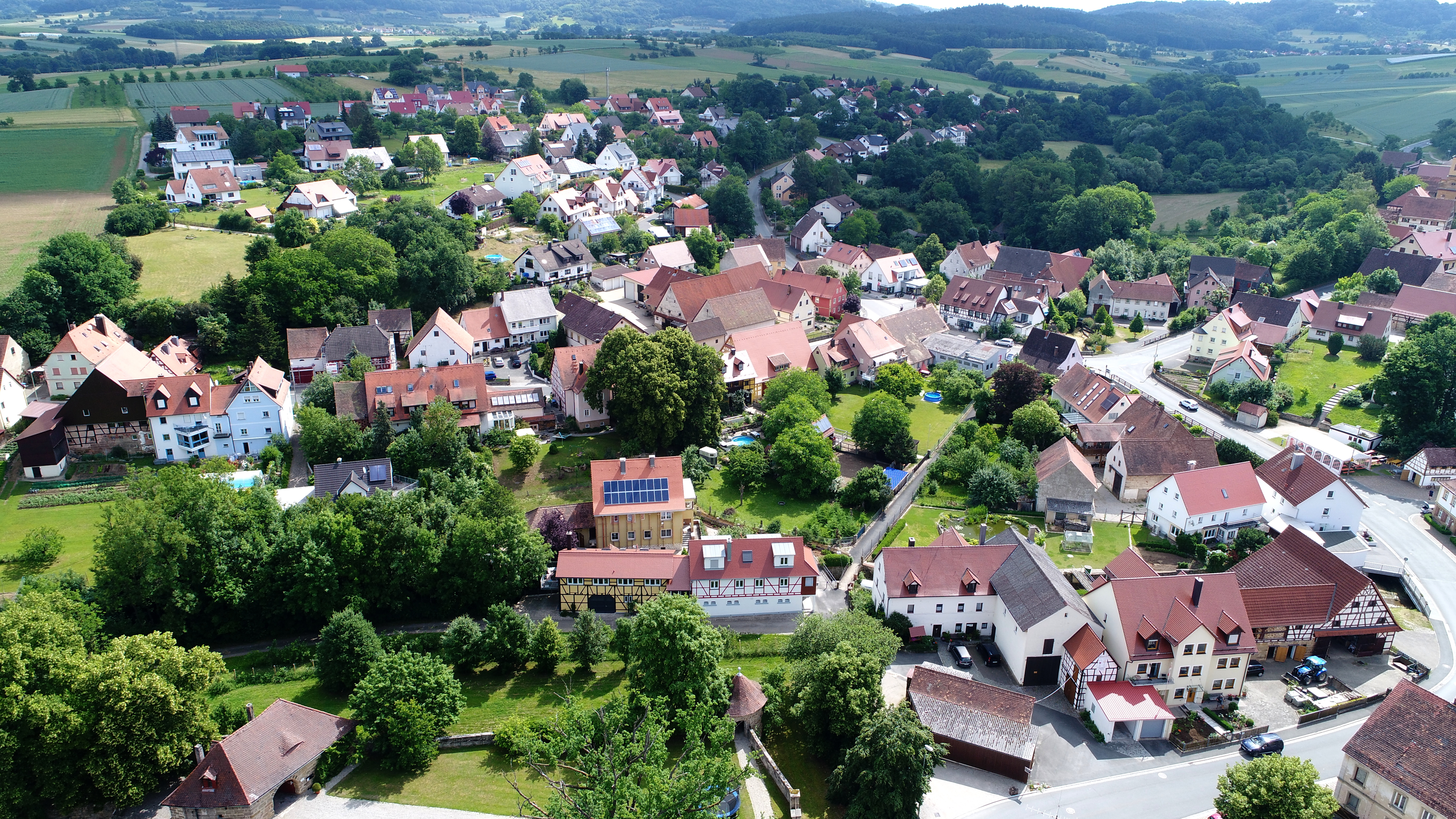 Kunreuth aus der Vogelperspektive (2018)